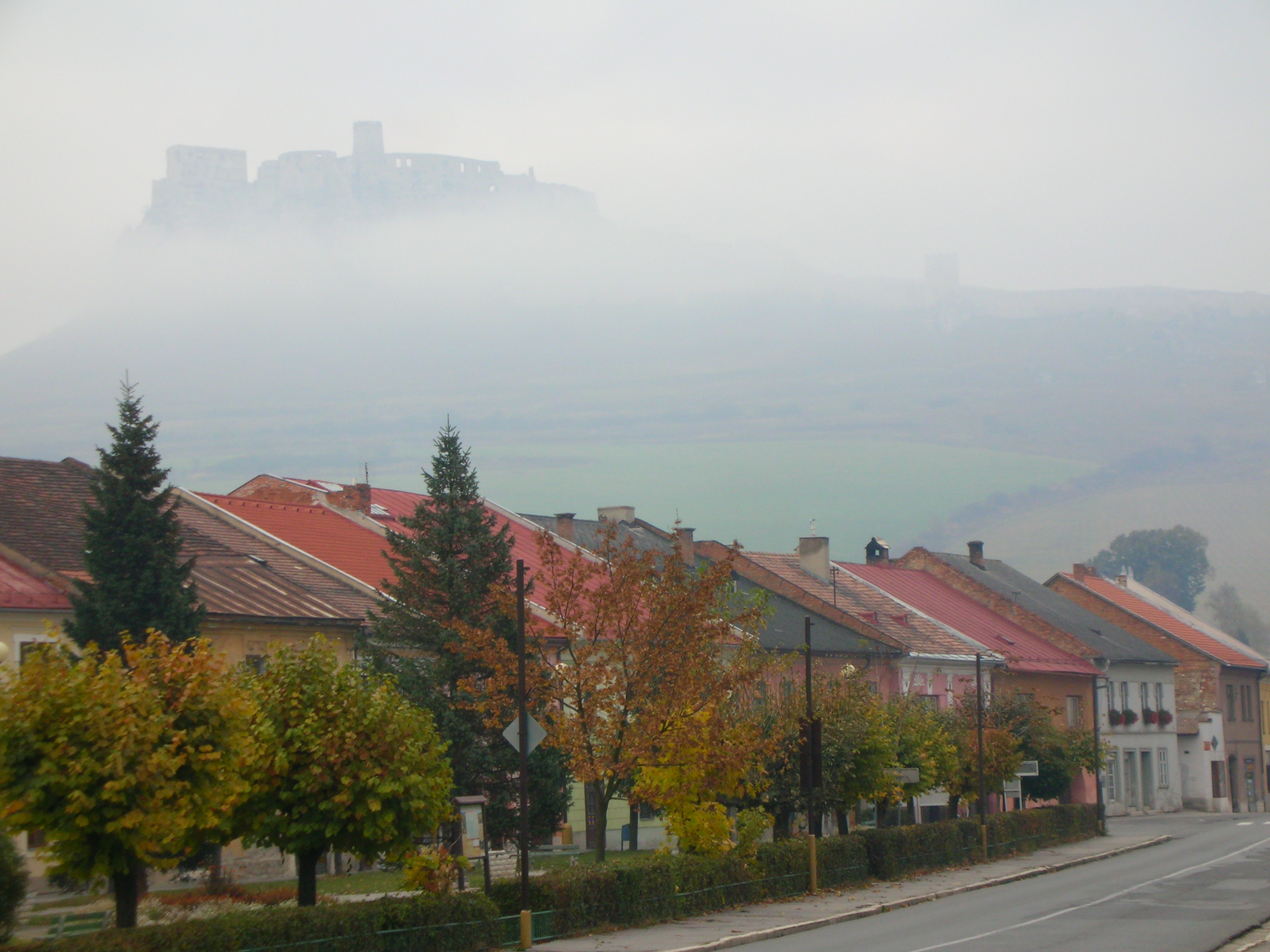 Levoča, v pozadí silueta Spišského hradu